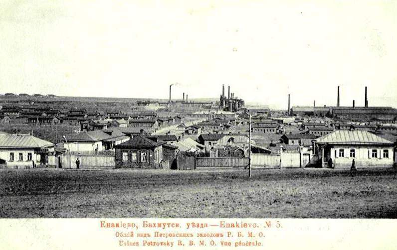 Дореволюционная открытка Енакиево